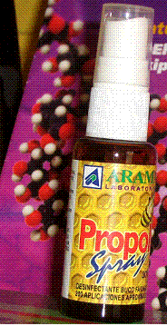 Pharmaceutical produce, from Chilean Market